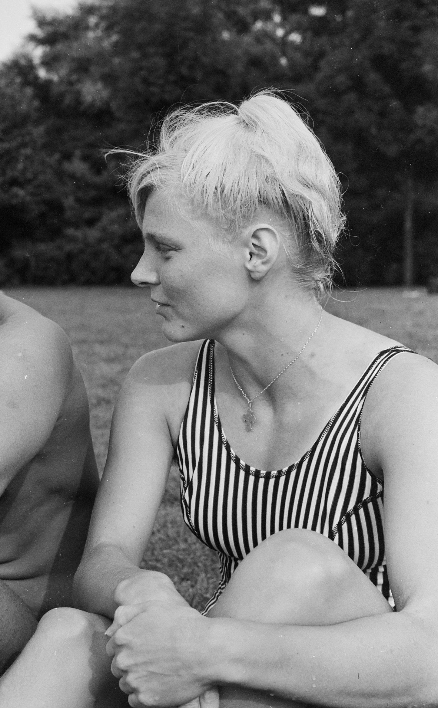 Zweminterland Nederland B tegen Denemarken, Kirsten Michaelsen